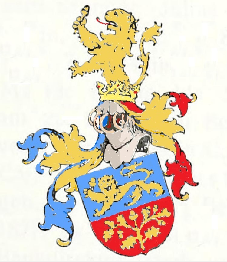 Wappen der Familie von Cramer (Königslutter, Hannover 1742). koloriert nach Beschreibung in: v. Alten: Die Famile Cramer (Krahmer). Anfrage in Rheude, Lorenz M., (Hrsg.): Wellers Archiv für Stamm- und Wappenkunde, Organ des Roland-Vereins zur Förderung der Stammkunde. 3. Jg. 1902-1903 (Verlag Gebr. Vogt, Roda 1903), S. 76